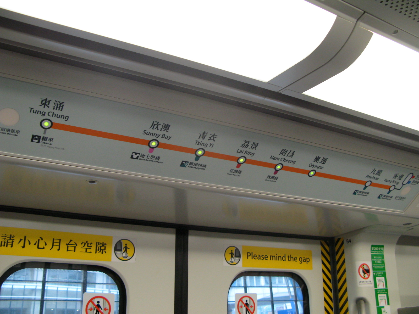 TCL train Routemap